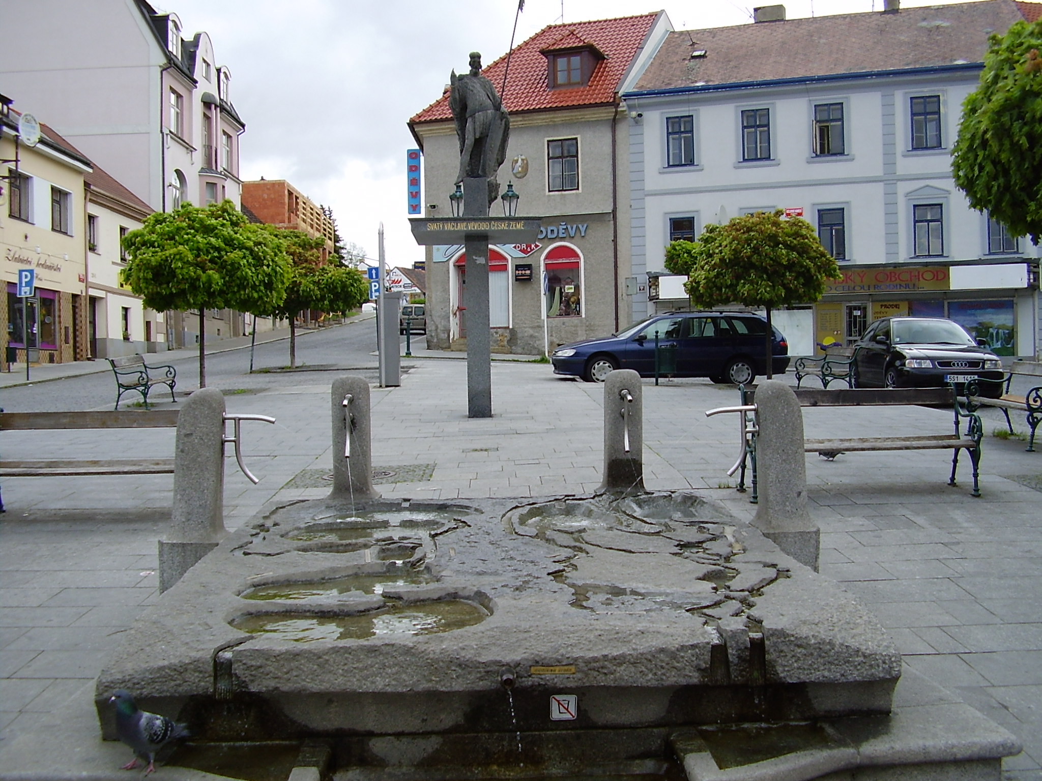 Příbram - Václavské nám.Pražská ulice